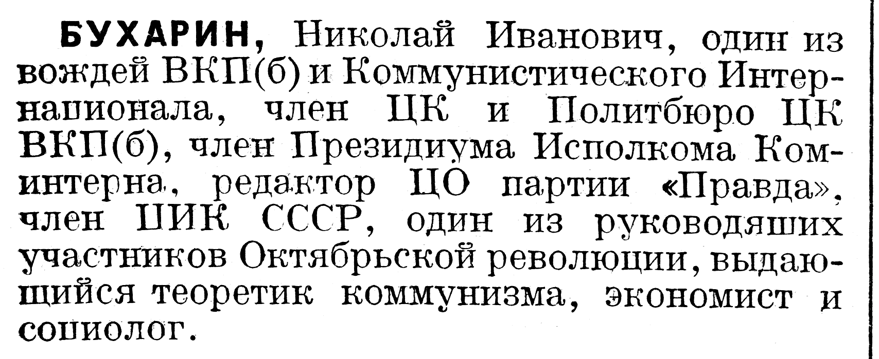 Начало статьи про Н. И. Бухарина. В БСЭ 1-изд. Во 2 и 3 изданиях о нём статей нет.